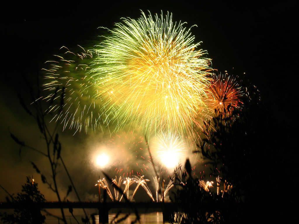 Evento pirotécnico en el Puente Viejo, Concepcion, Chile, por la llegada del 2007./Fireworks in Concepcion, Chile: New year.